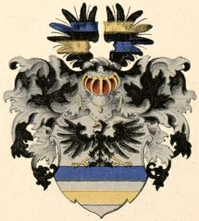 Manteuffel gen. Szoege parunivapp